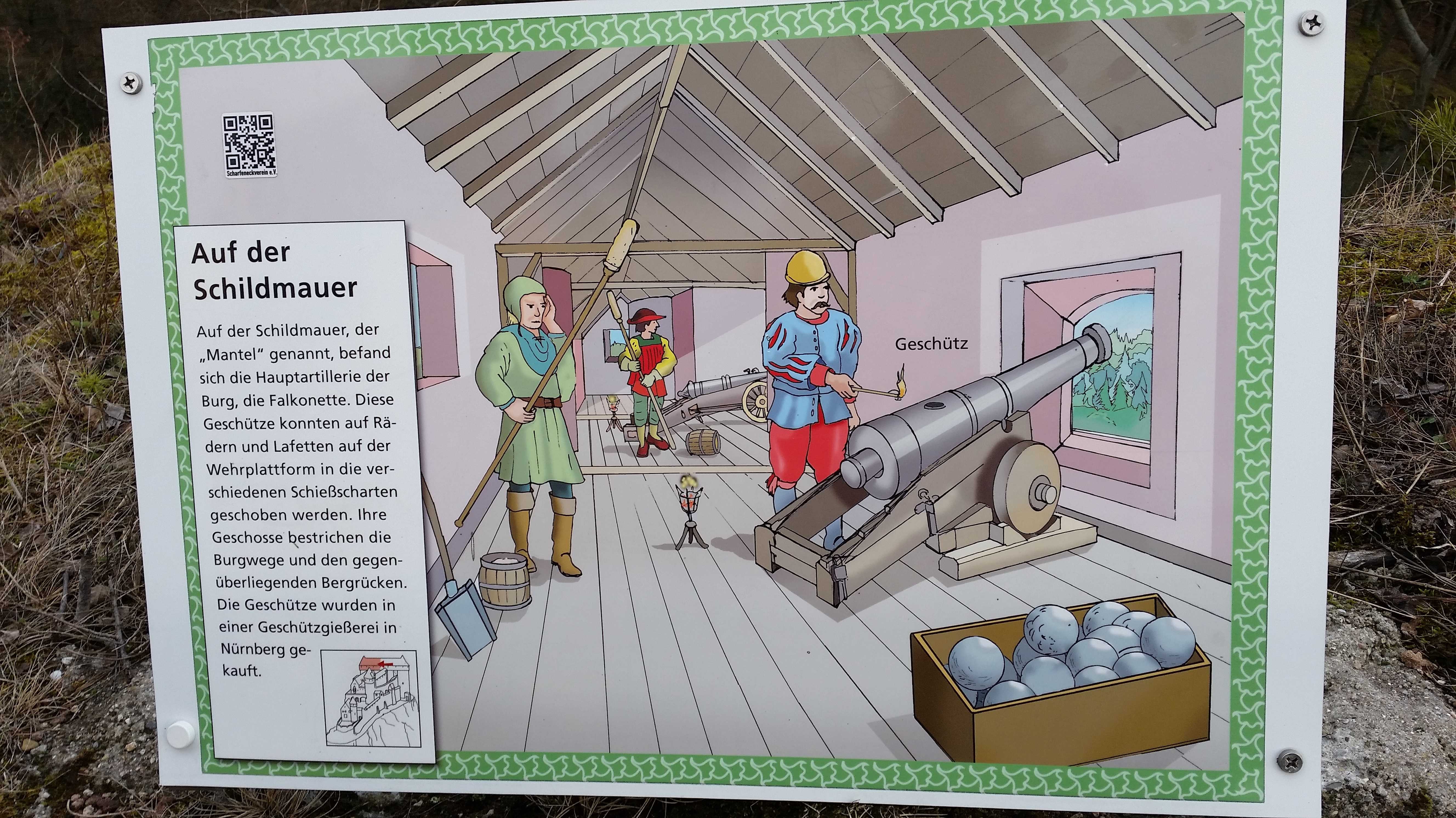 eine der zahlreichen Schautafeln zeigt, wie der Geschützstand auf der Schildmauer ausgesehen haben könnte.